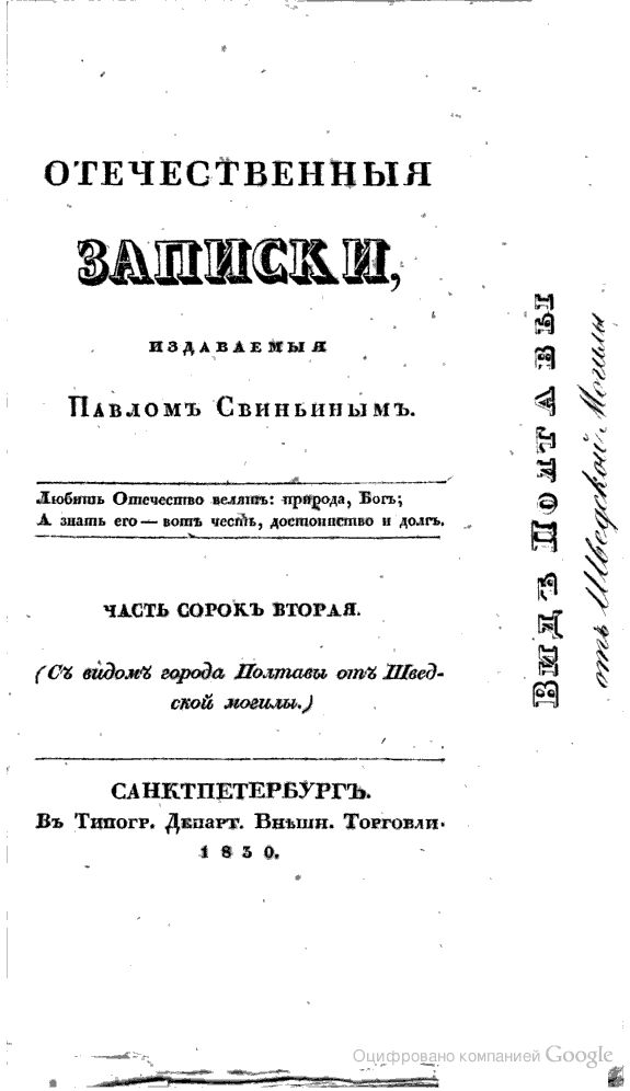 Обложка журнала "Отечественные записки"